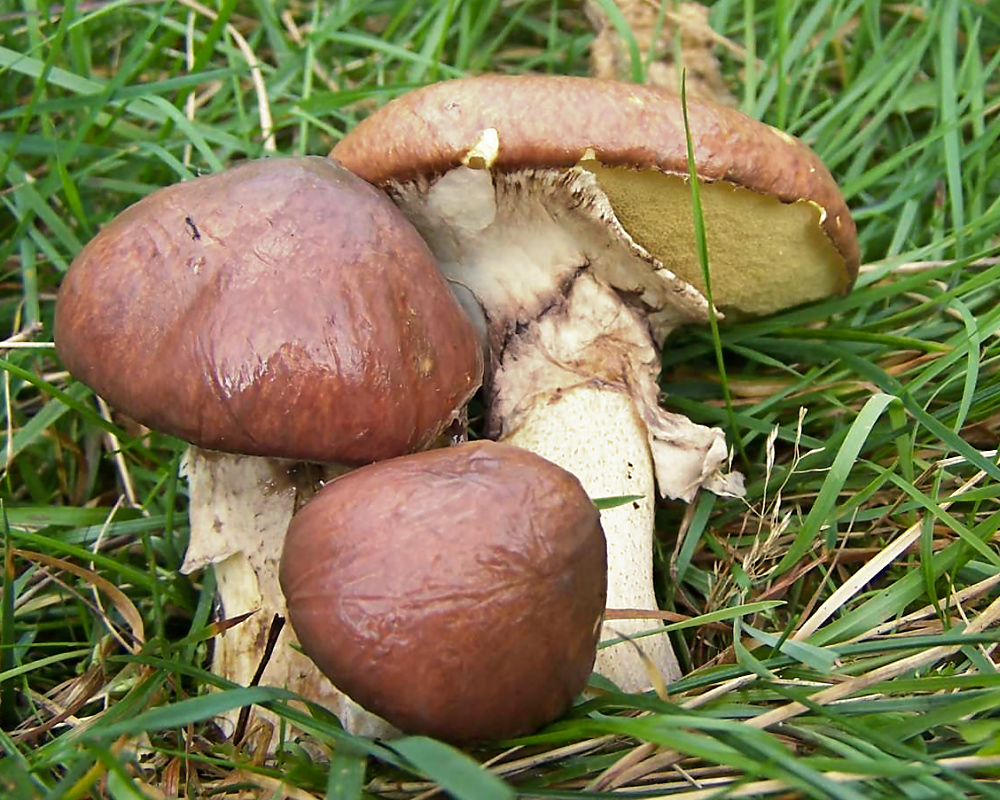 Name:Suillus luteus, Family:Boletaceae (pl. maślak zwyczajny)